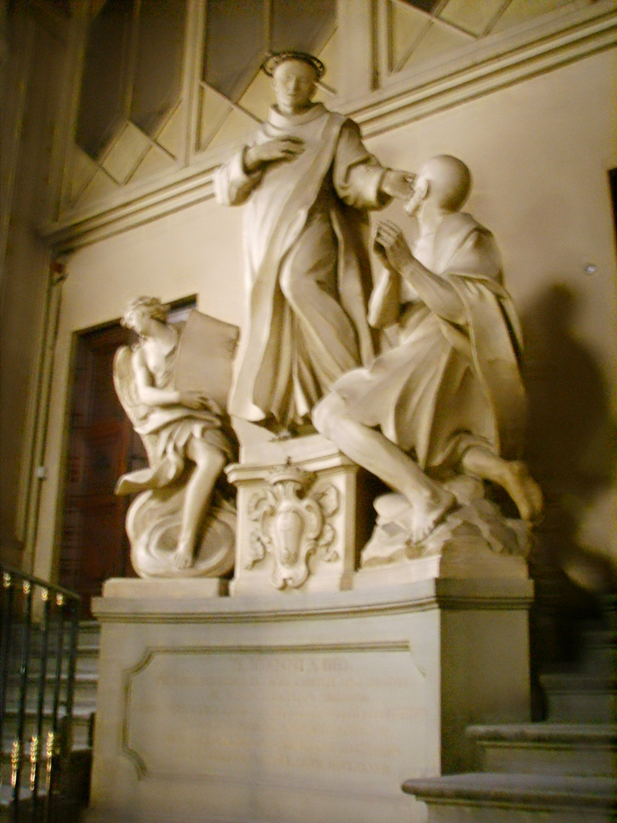 San Giovanni di Dio statua